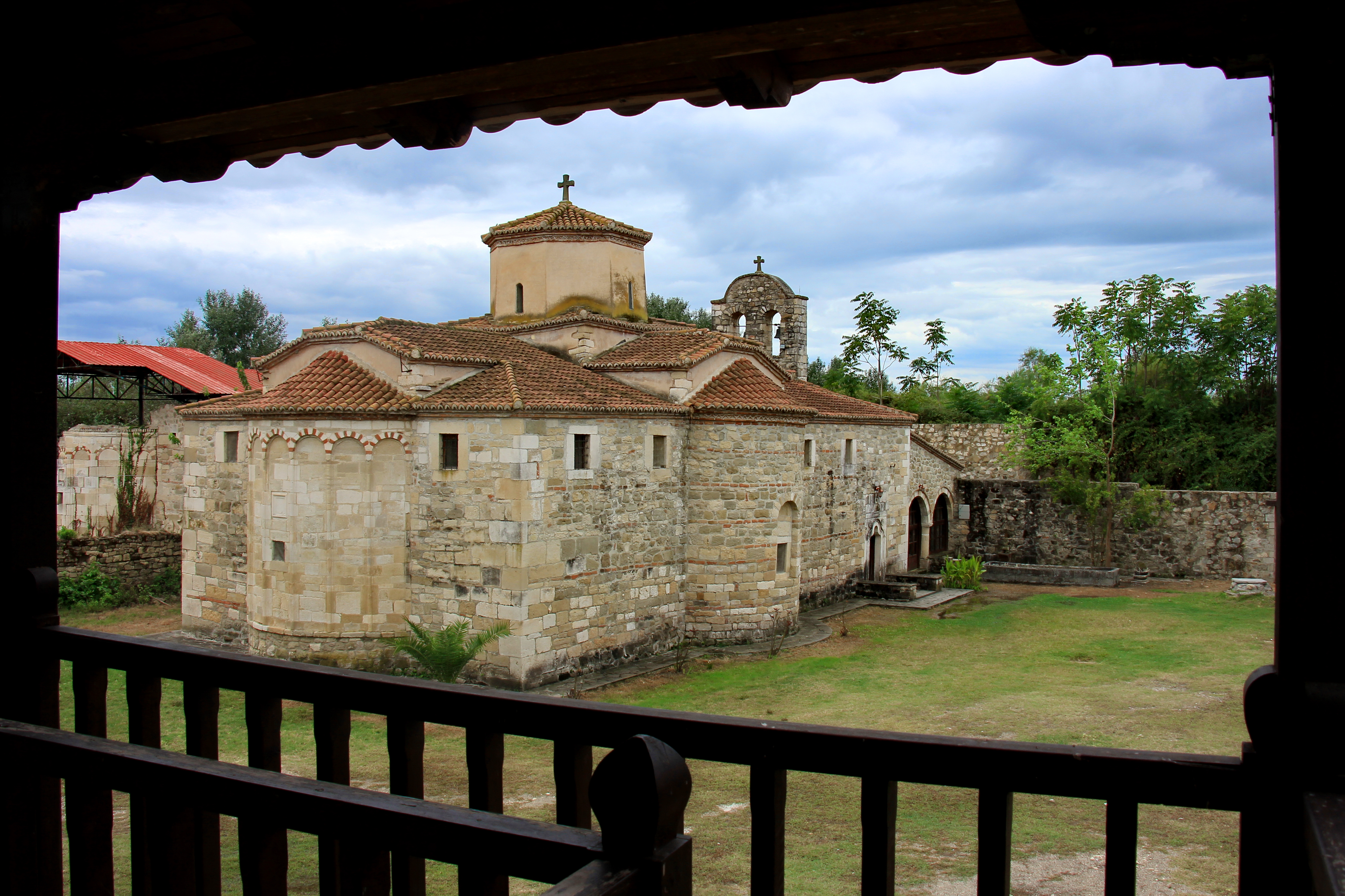 Kisha e Shen Kozmait (Kolkondas)